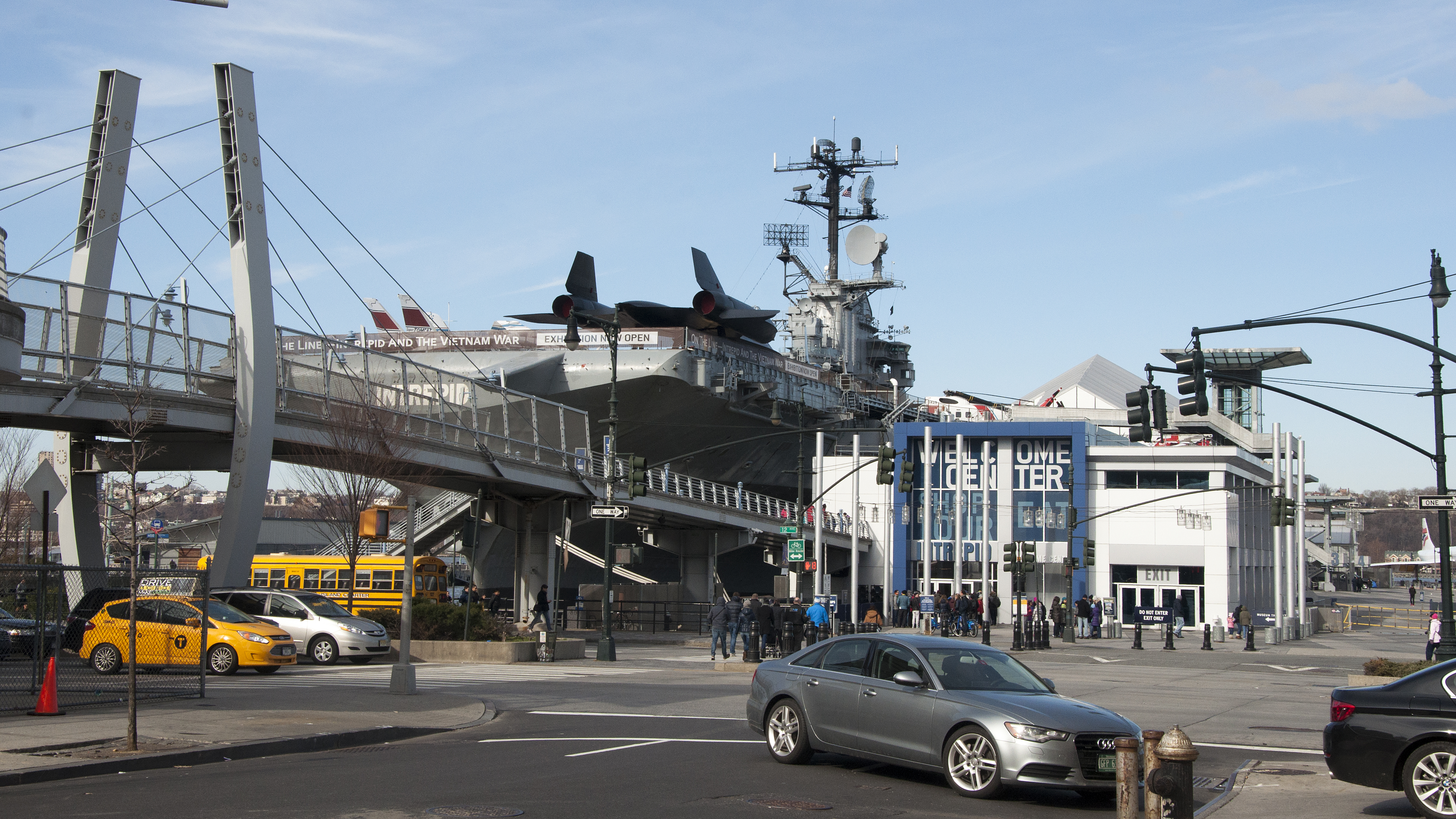 Intrepid Sea, Air & Space Museum, New York City